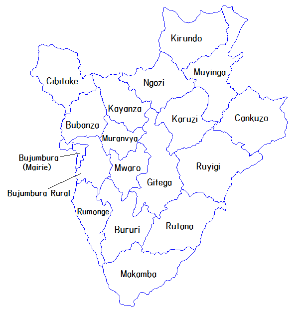 ブルンジの州地図に名称を入れたもの。